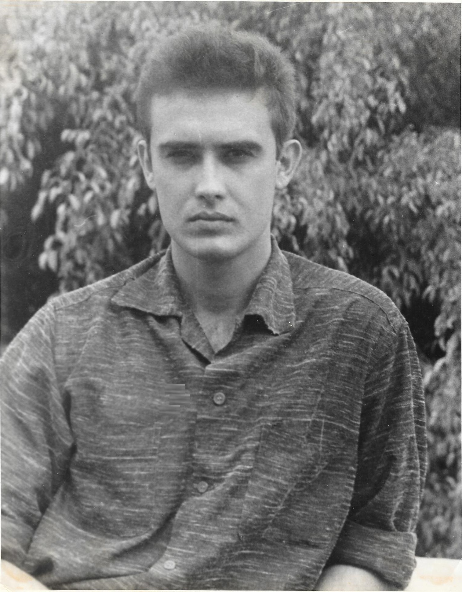 Eduardo Moure en 1956.